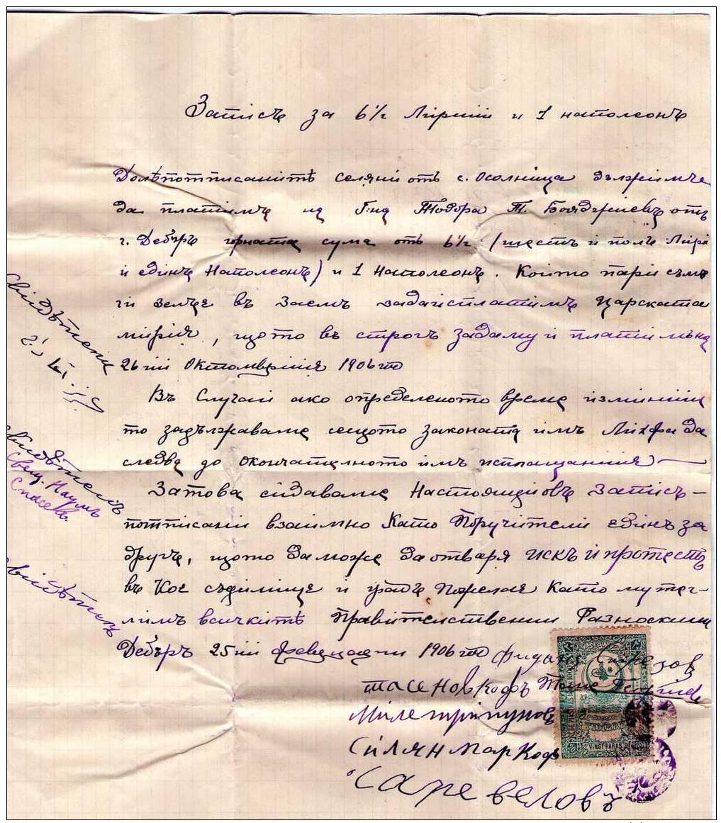 Запис за пари от село Осолница, Дебърско